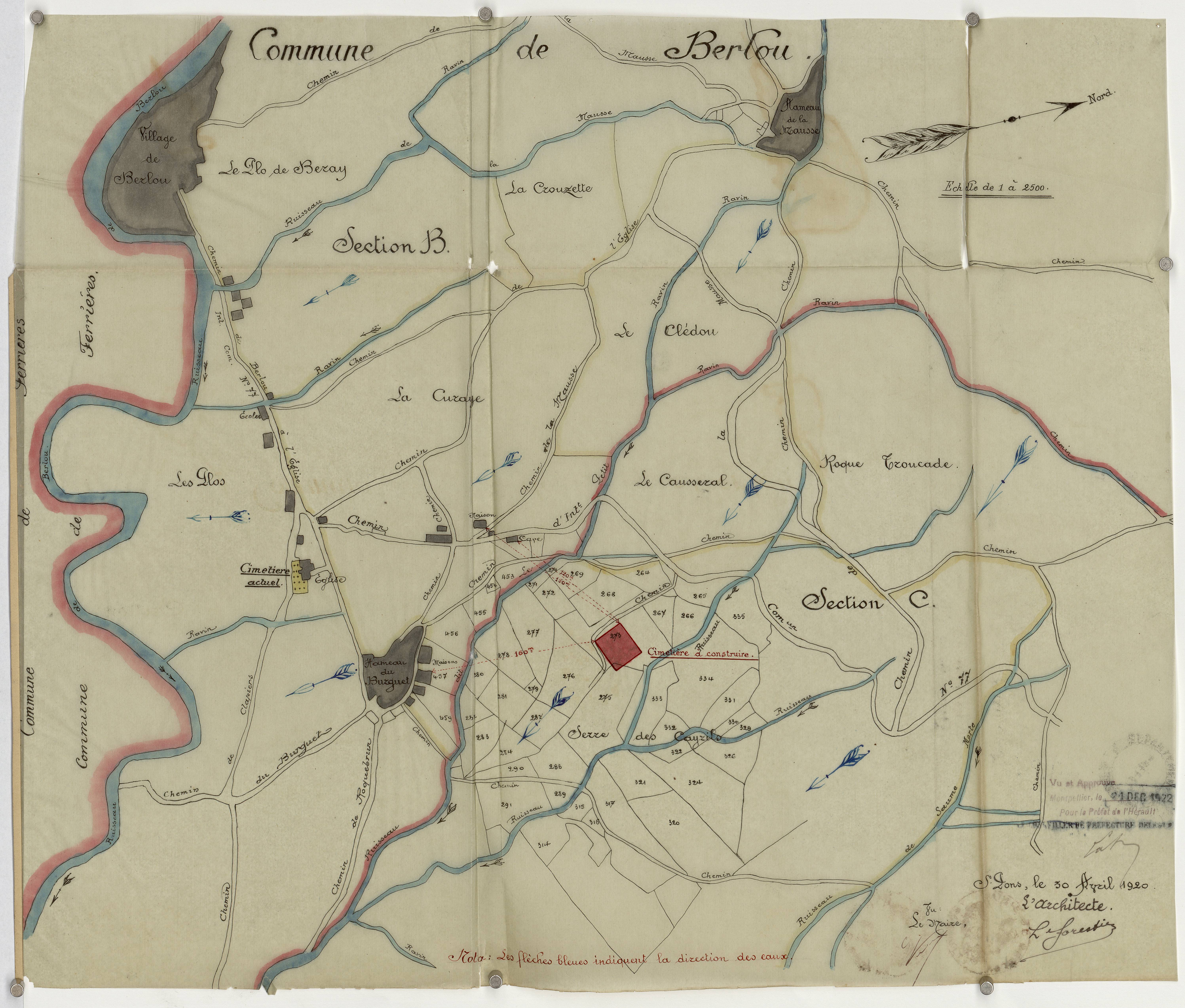 Berlou. - Translation du cimetière communal : plan d'ensemble